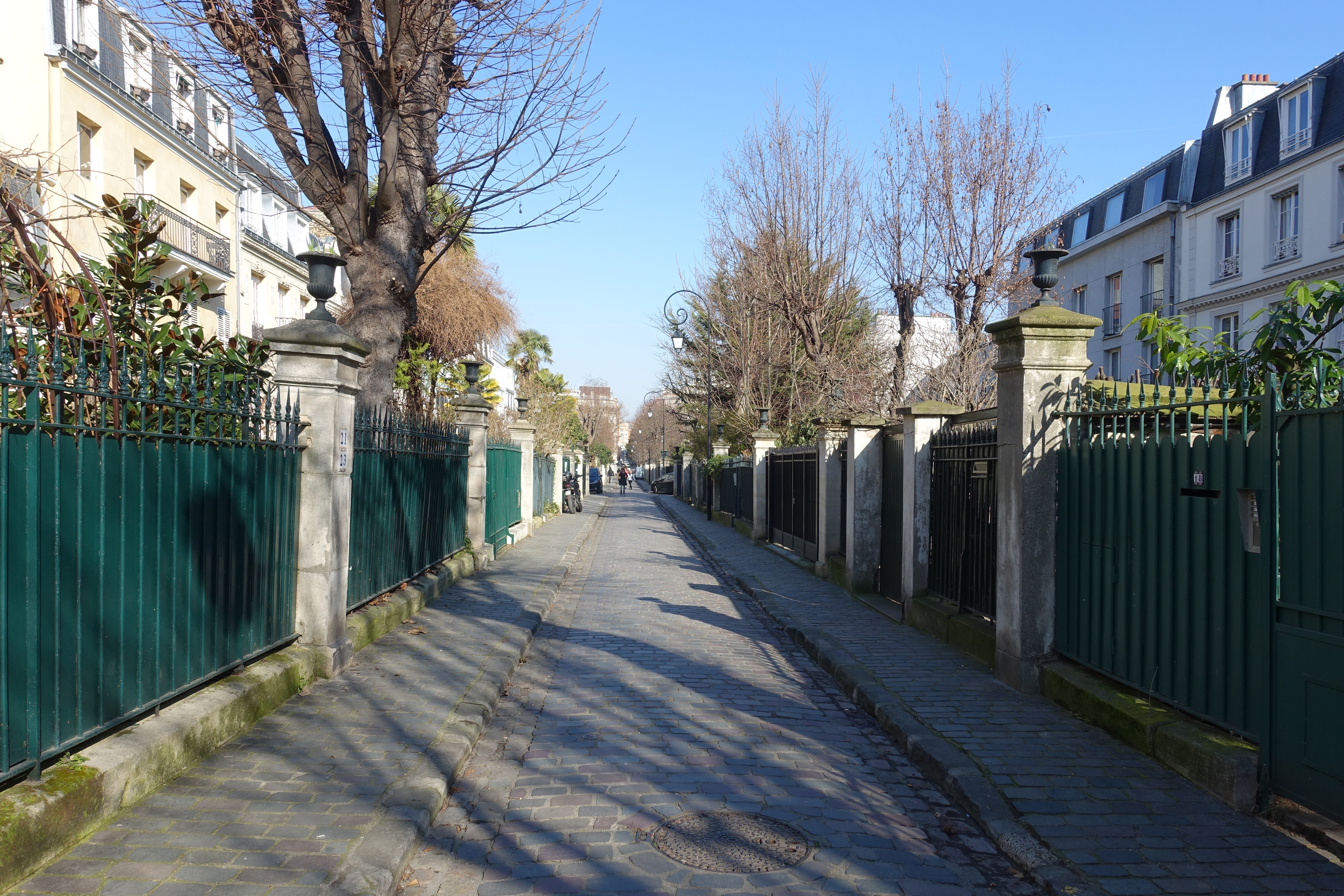 Cité des Fleurs @ Epinettes @ Paris 17